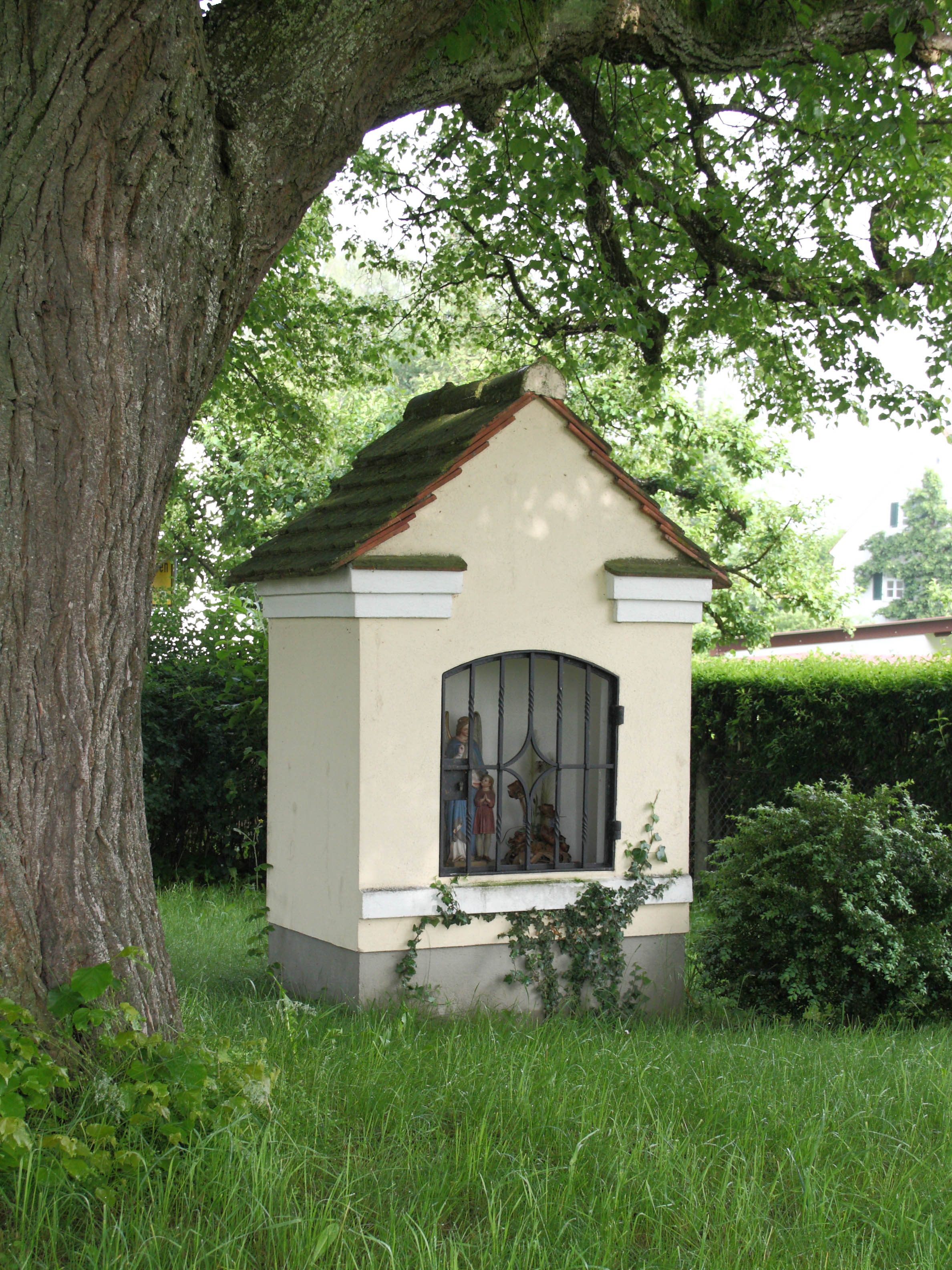 Bildstock am südl. Ortsrand von Aletshausen, 1. Hälfte 18. Jh.